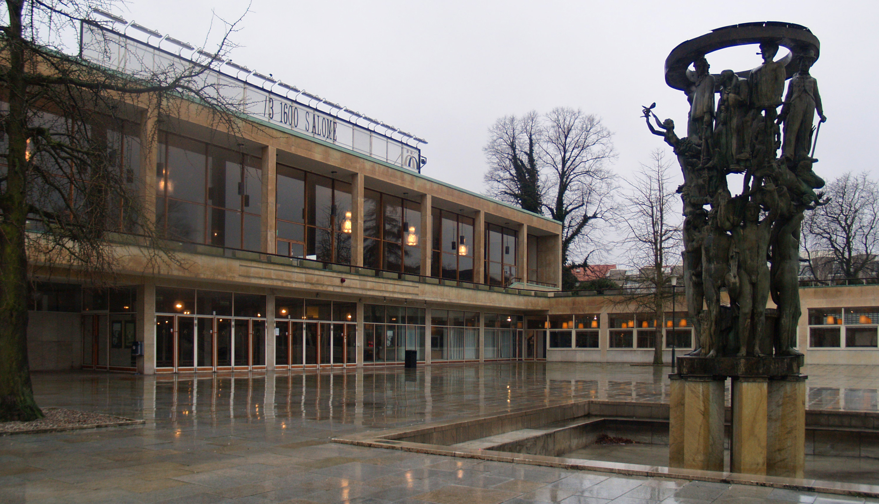 malmö stadsteater, malmö, sweden, 1935-1944. architects: sigurd lewerentz with david helldén and erik lallerstedt.